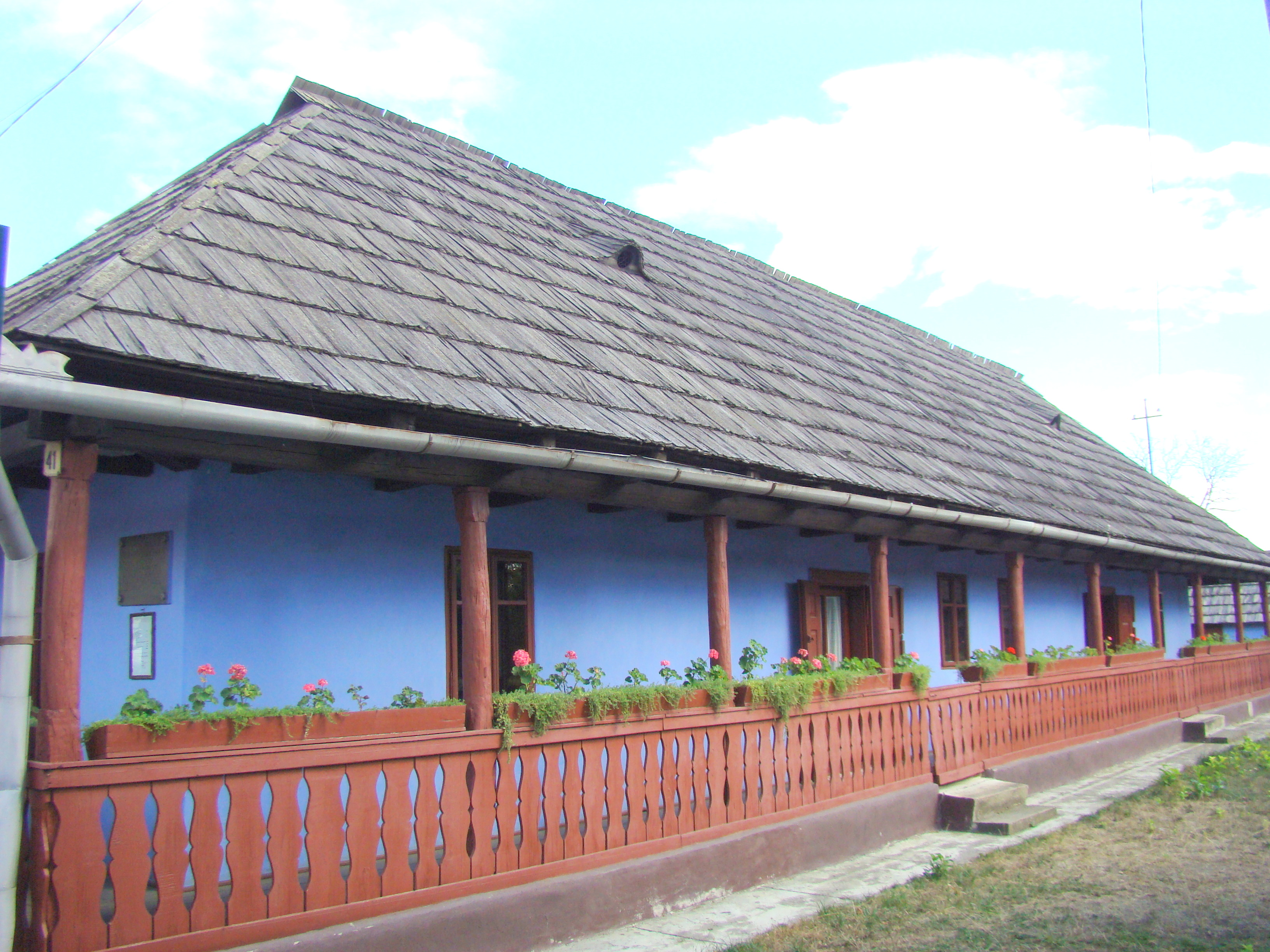 Muzeul memorial "Ion Pop Reteganul" ,sat RETEAG; comuna PETRU RAREŞ